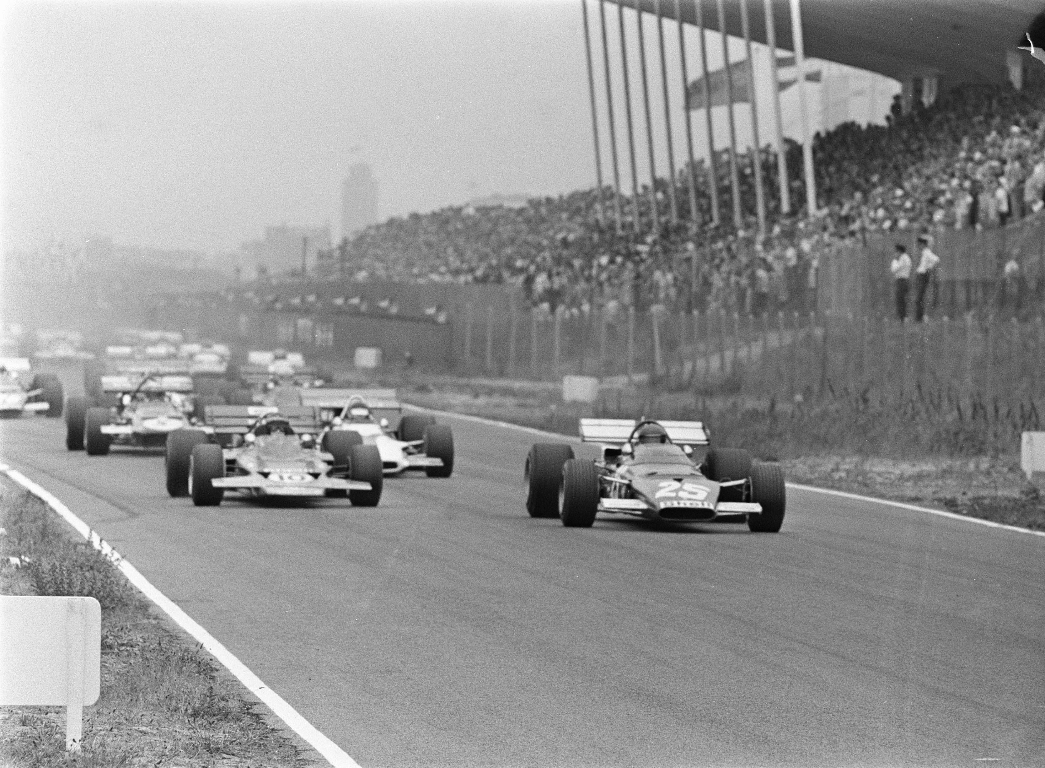 Grand Prix 1970 van Nederland voor Formule I wagens , Zandvoort; nr. 7, 8: Foine Hezemans in aktie in sportwagen.